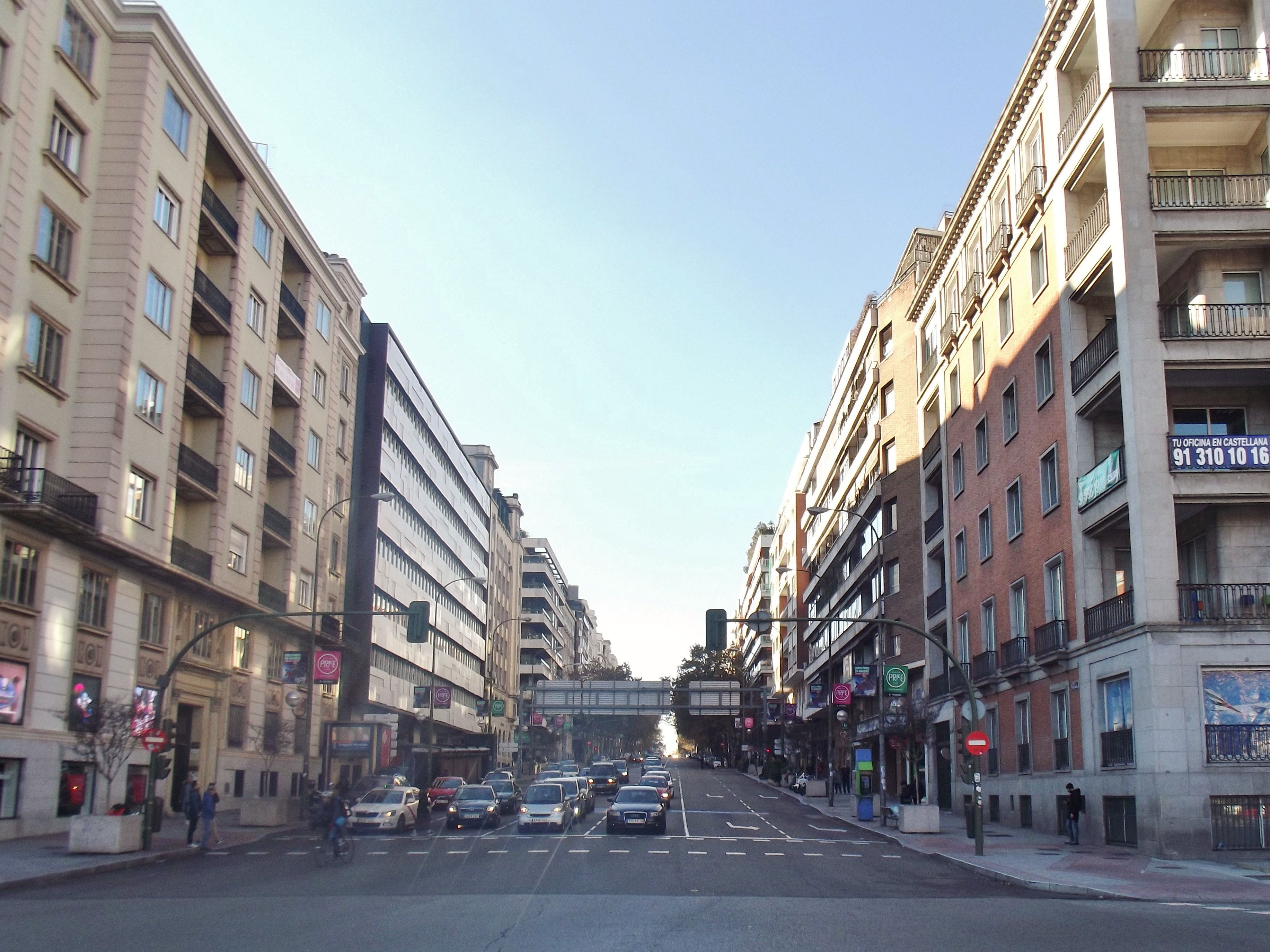 Calle de José Abascal.